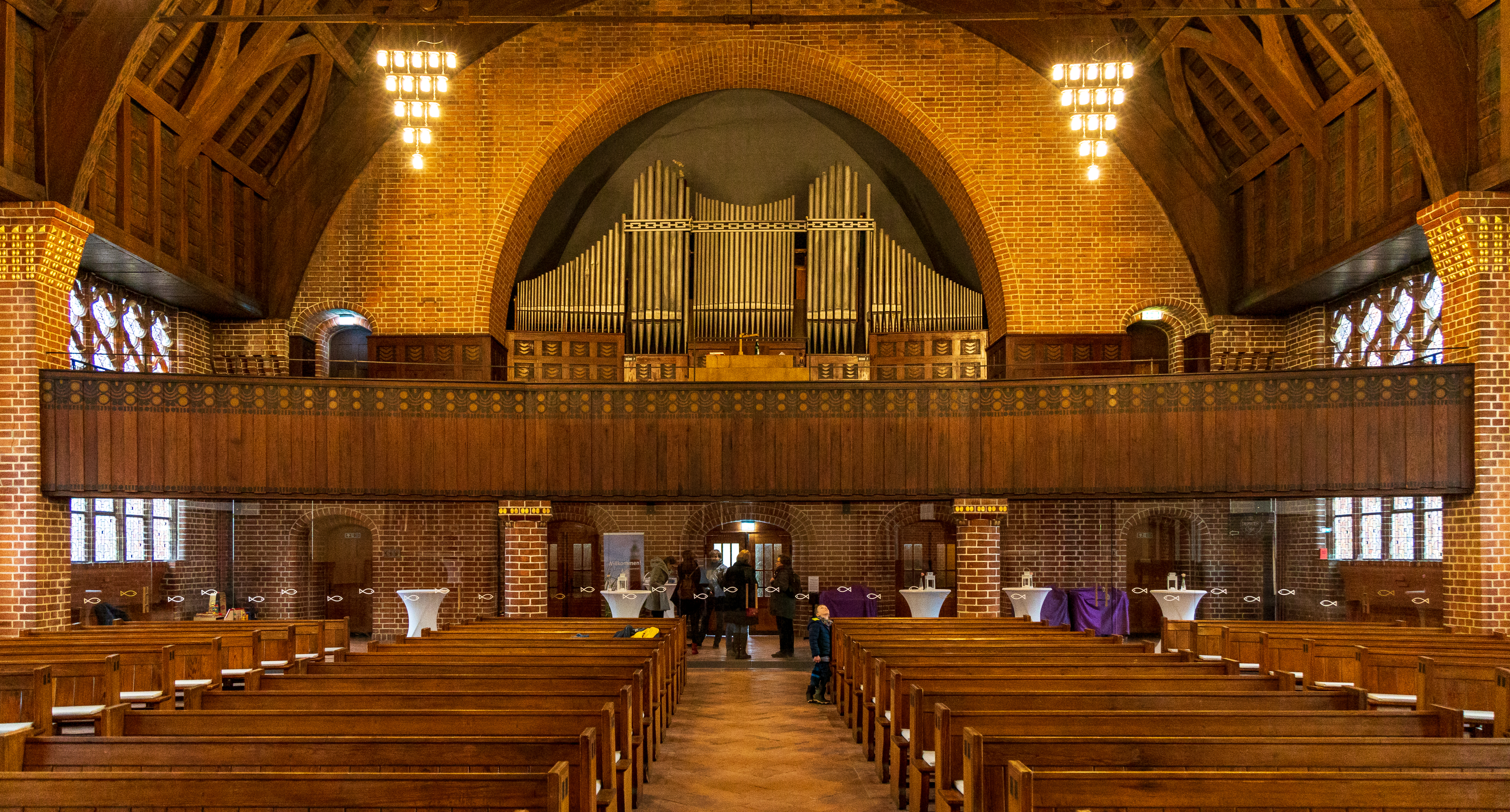 Petruskirche (Kiel-Wik) – Orgel